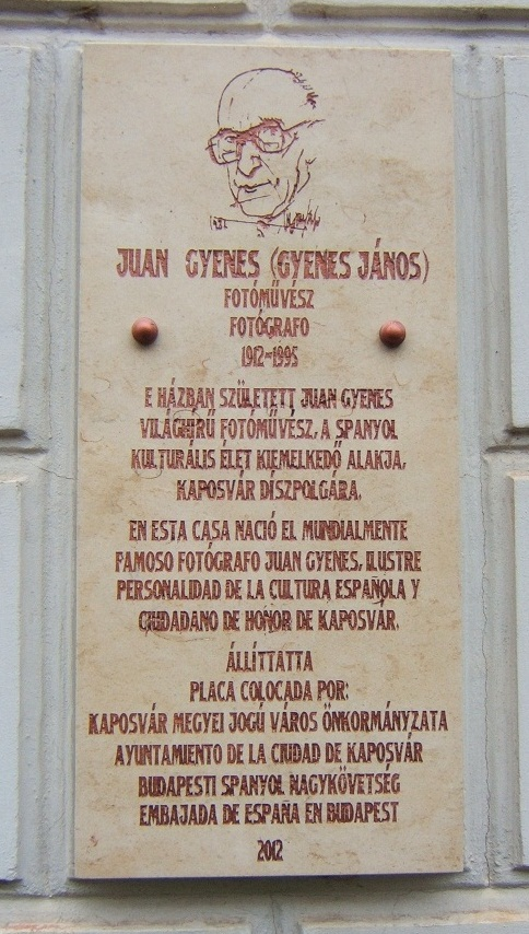 Gyenes János (Juan Gyenes) emléktáblája kaposvári szülőházán